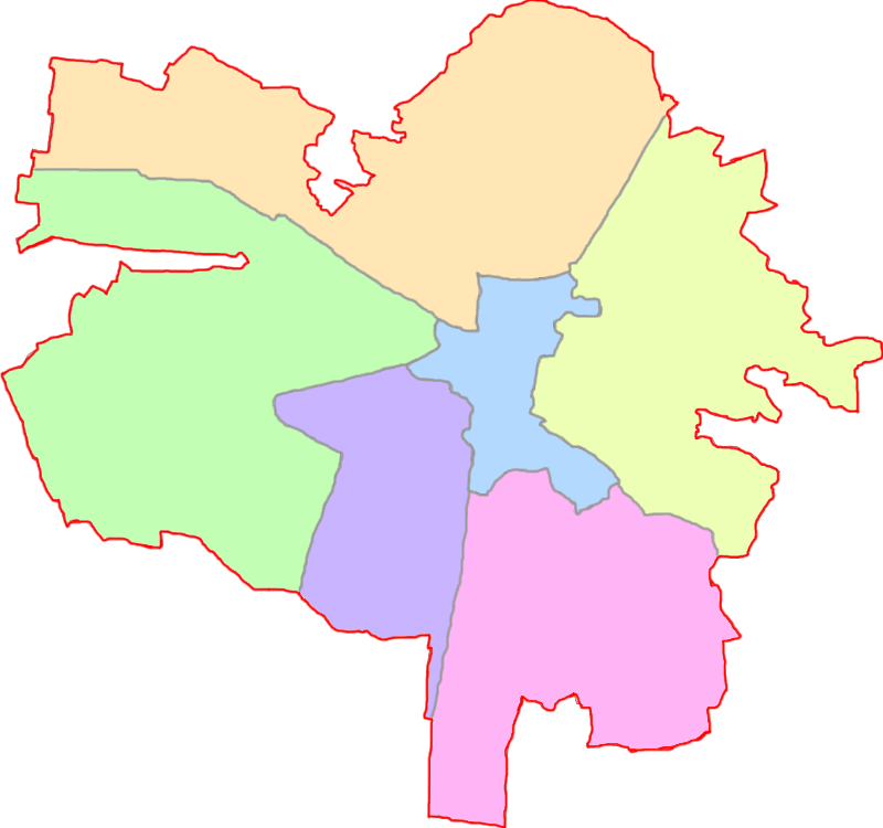 Райони Львова